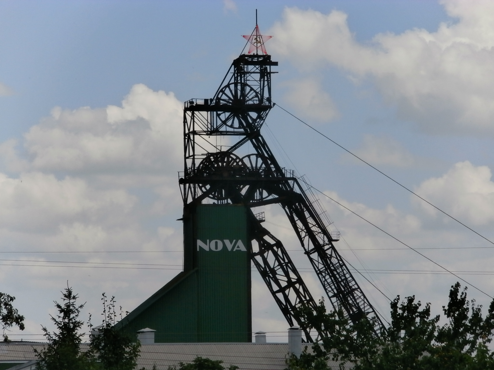 Erzmine "Nowa" Schowti Wody Förderturm